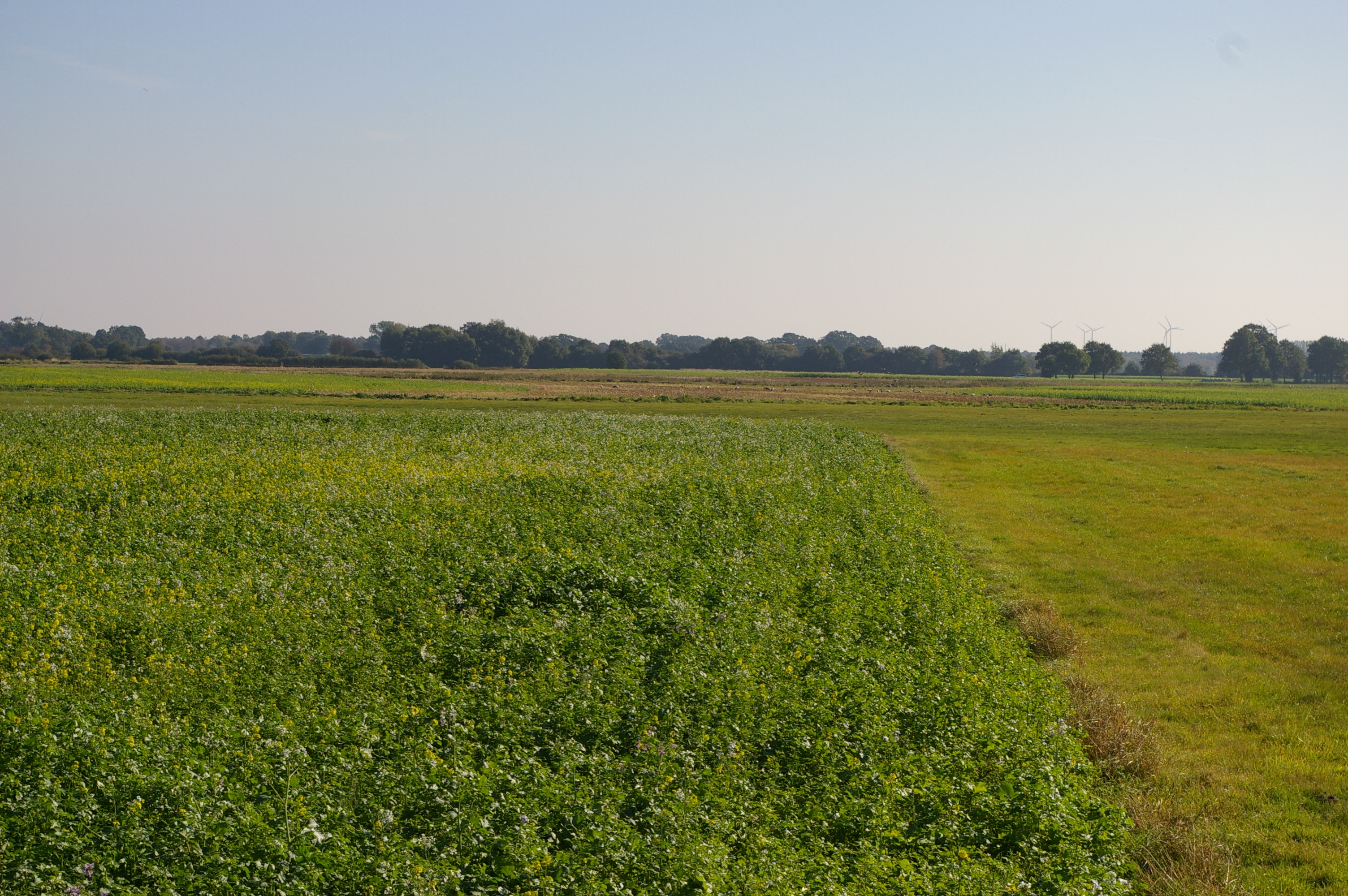 Die Bleckriede nördlich von Ströhen